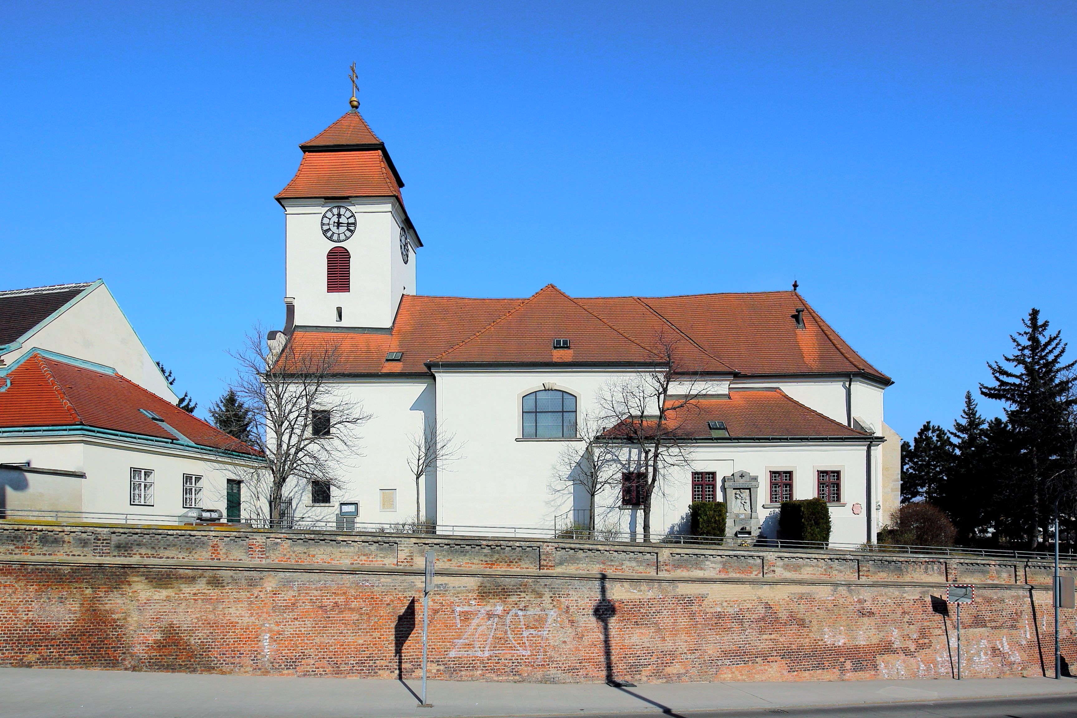 Südwestansicht der röm.-kath. Pfarrkirche hl. Laurenz (Altsimmeringer Pfarrkirche) in Simmering, ein Stadtteil der österreichischen Bundeshauptstadt Wien.